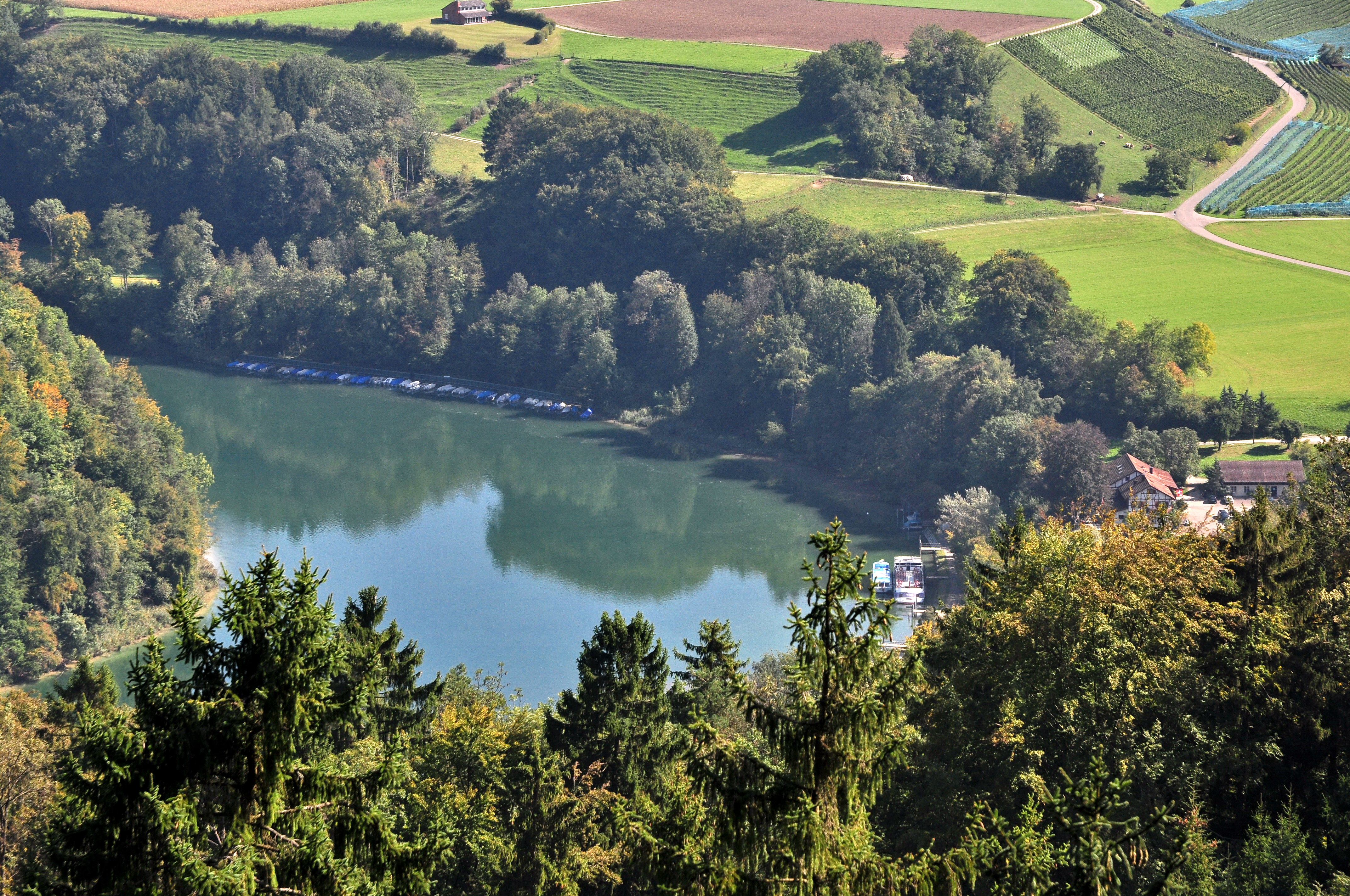 Tössegg in Freienstein-Teufen (Switzerland)